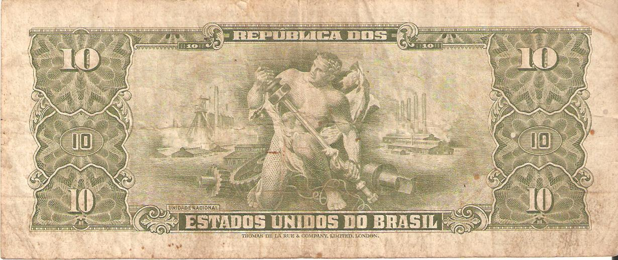 Parte de trás da moeda de dez cruzeiros